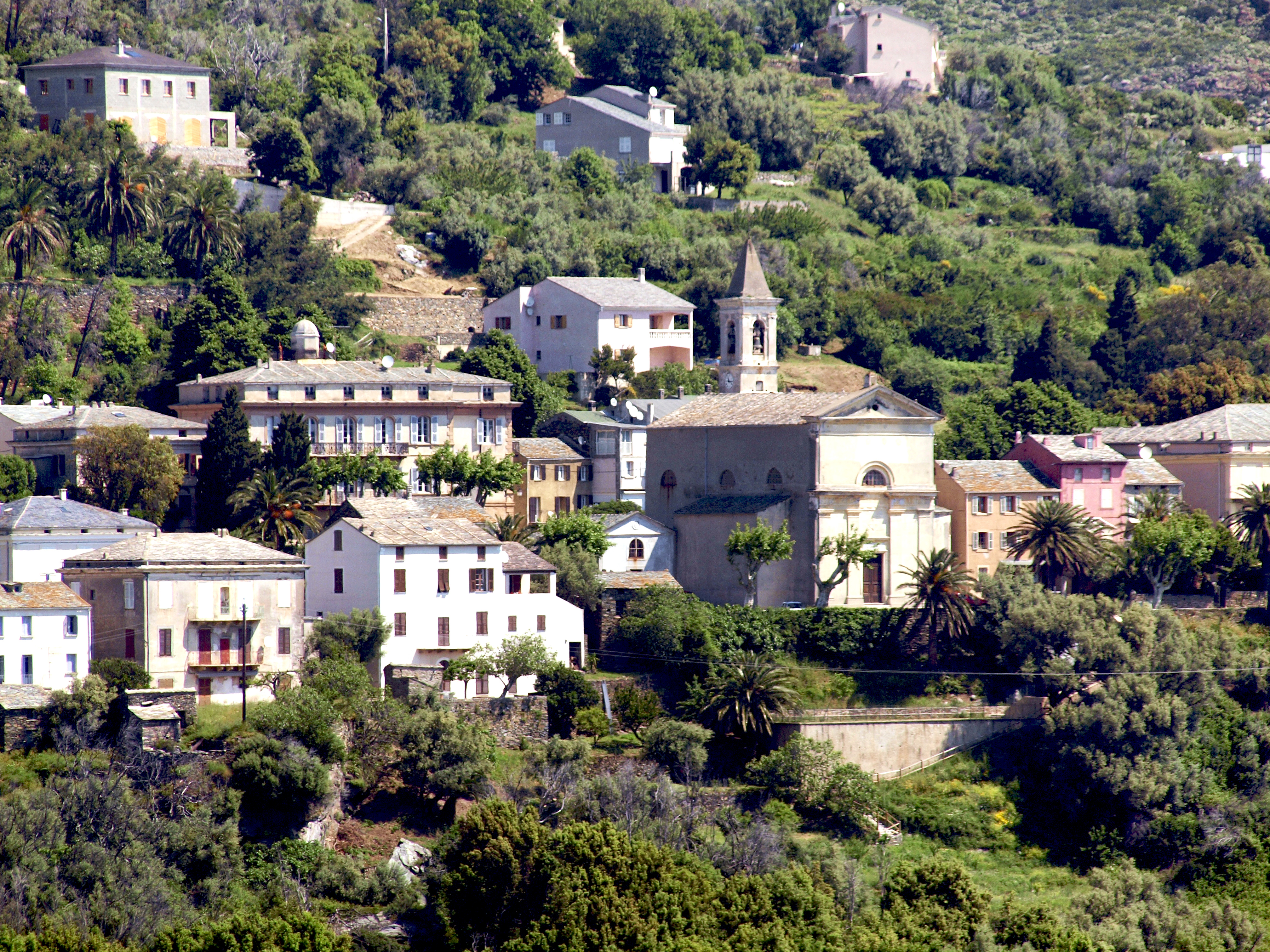 Santa-Maria-di-Lota, Cap Corse (Haute-Corse) - L'église Sant' Antone (Saint-Antoine) à Figarella, de la fin du XIXe siècle.